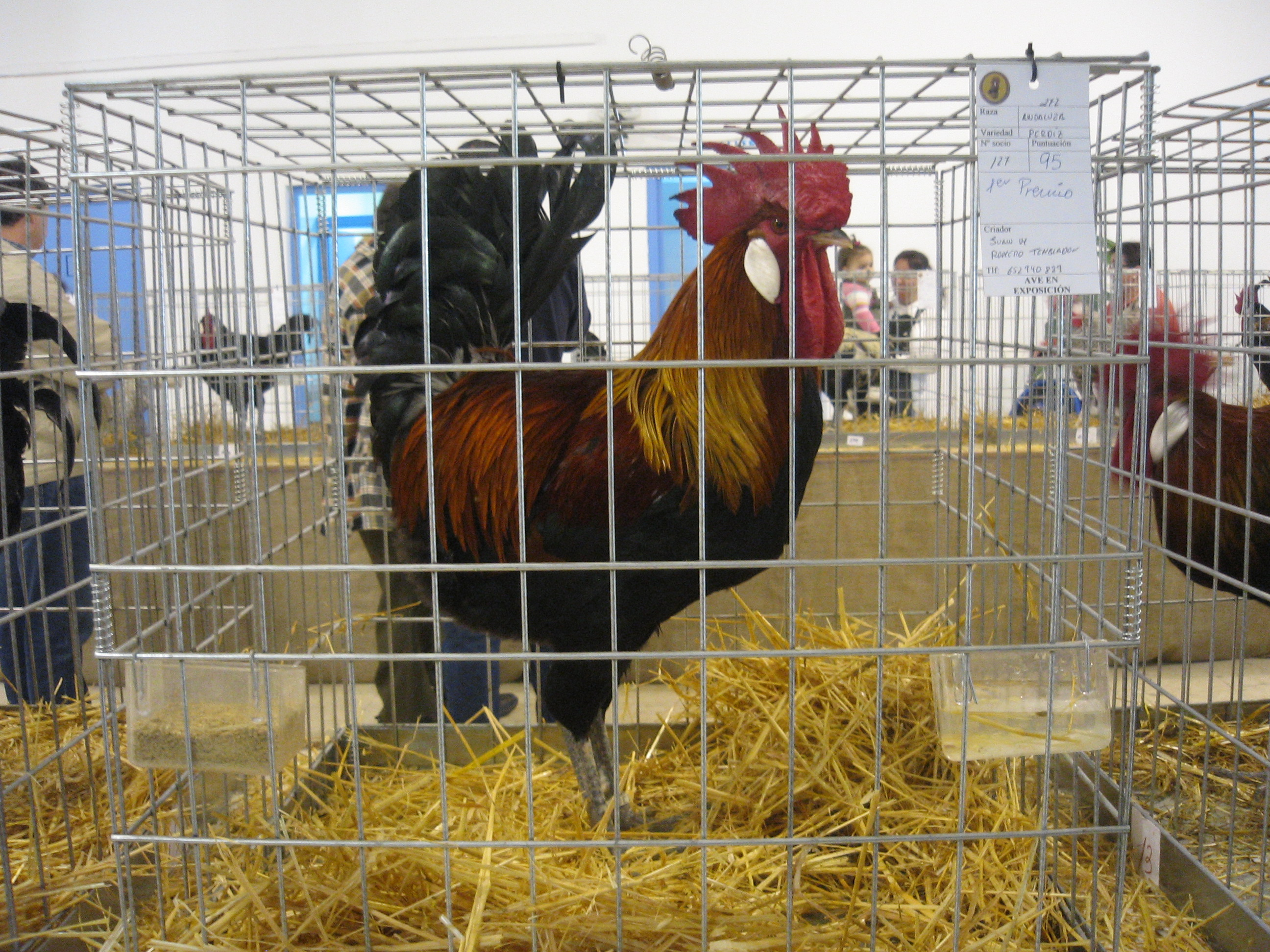 Gallo andaluz perdiz en la VI Exposición Avícola Gaditana, en Los Barrios.